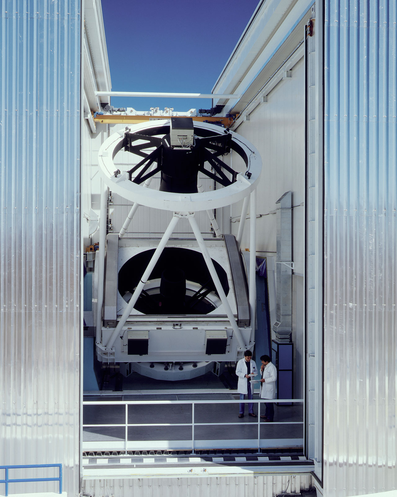 Widok na teleskop.